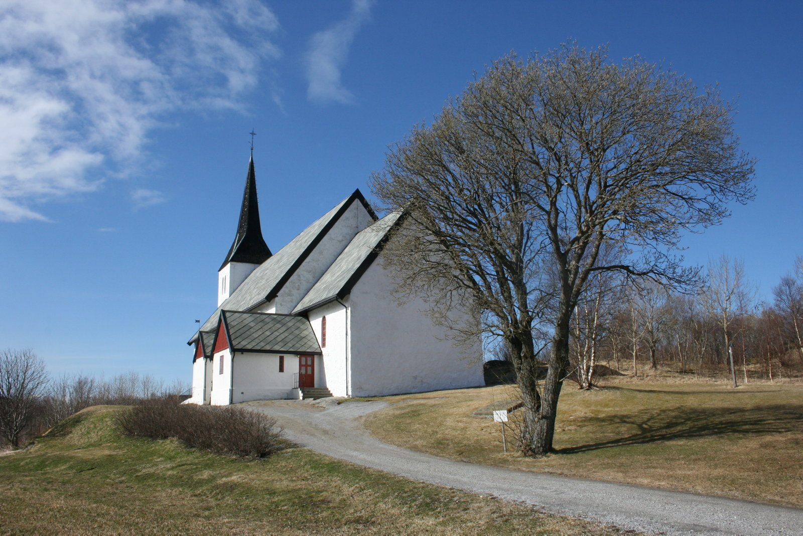 Roan kirke. Foto: Linda Veiby/Riksantikvaren.